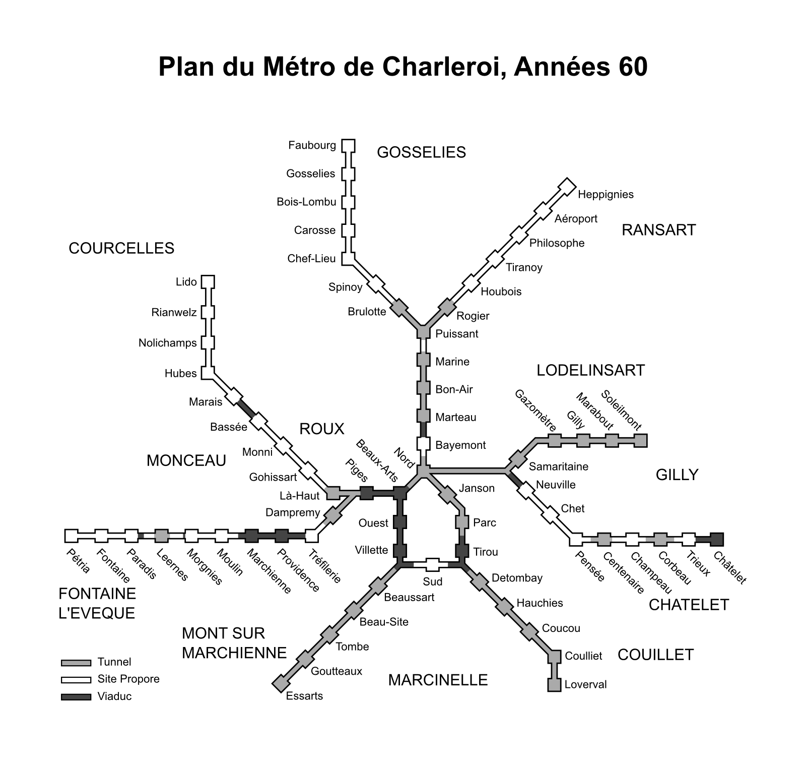 plan du métro de charleroi années 60